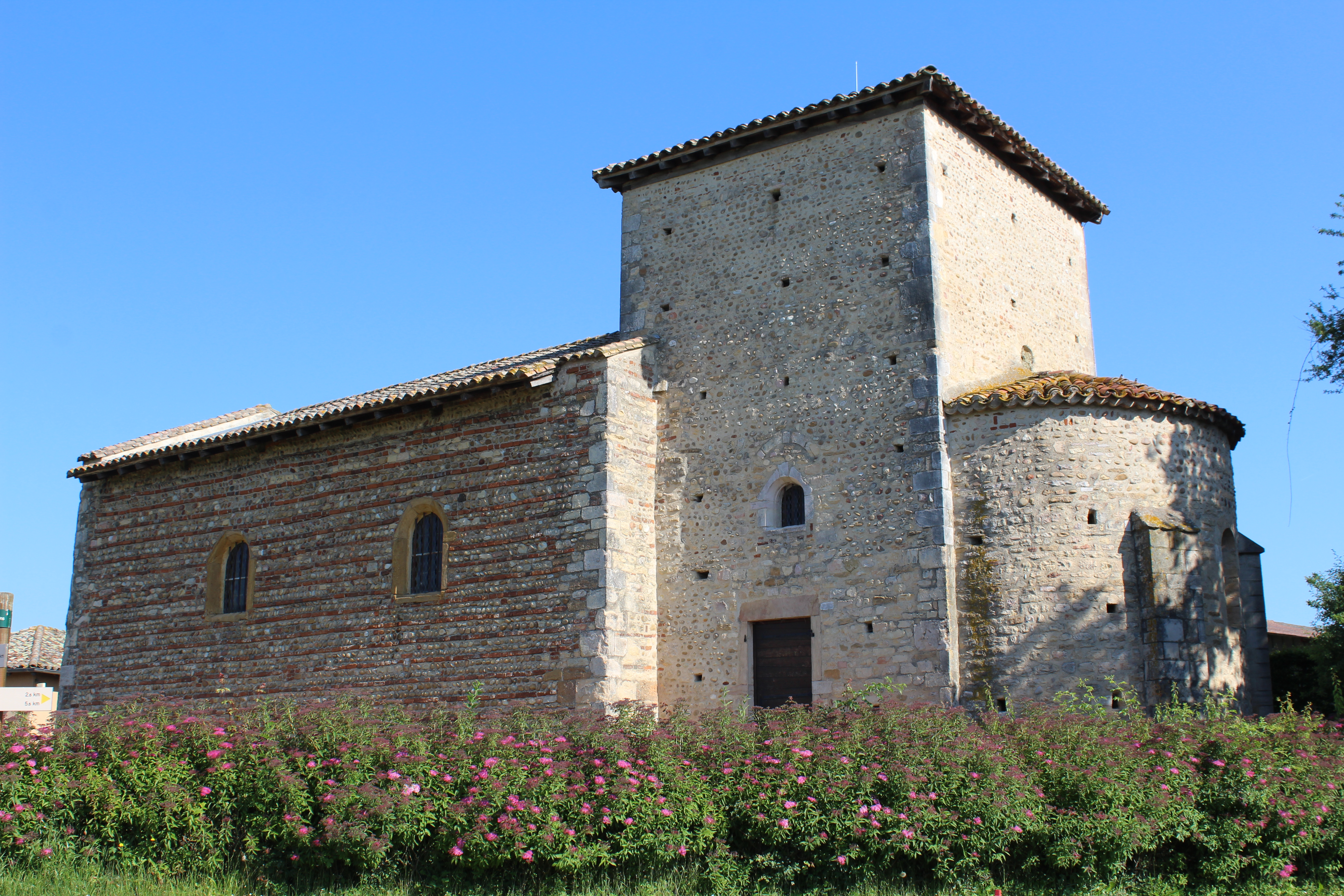 Chapelle Saint-Roch de Valeins.